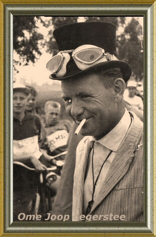 Grondlegger van Ome Joops Tour